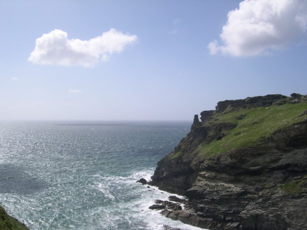 Péninsule du château de Tintagel (Angleterre).